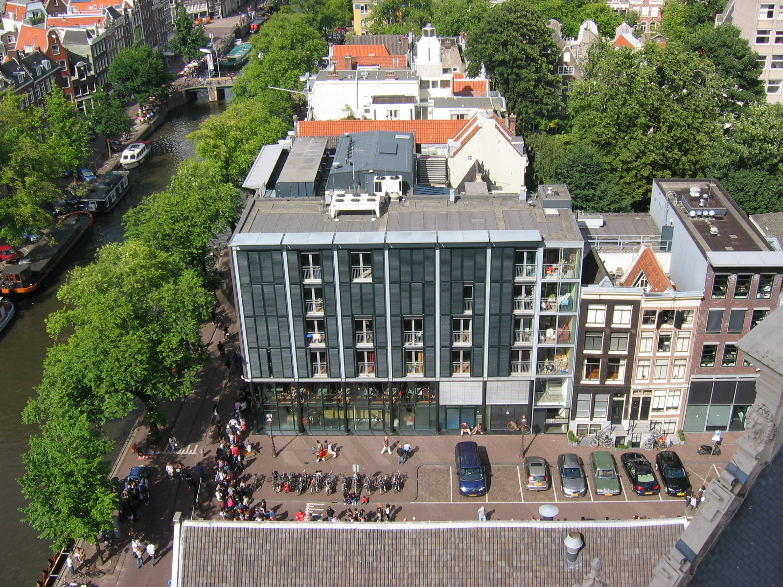 Beklimming van de Westertoren op donderdag 5 augustus 2010. Uitzicht op het Anne Frankhuis.